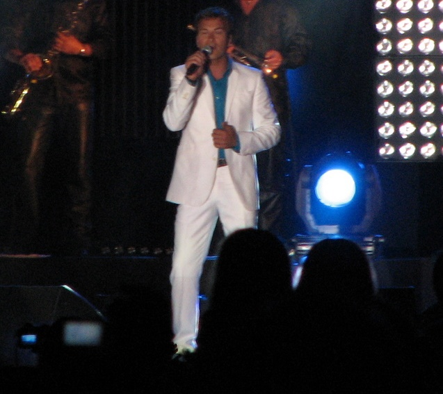 Tony Carreira ao vivo em Lagoa, no Algarve, em Portugal. Tony Carreira - Fatacil Agriculture and Tourism Fair - Lagoa